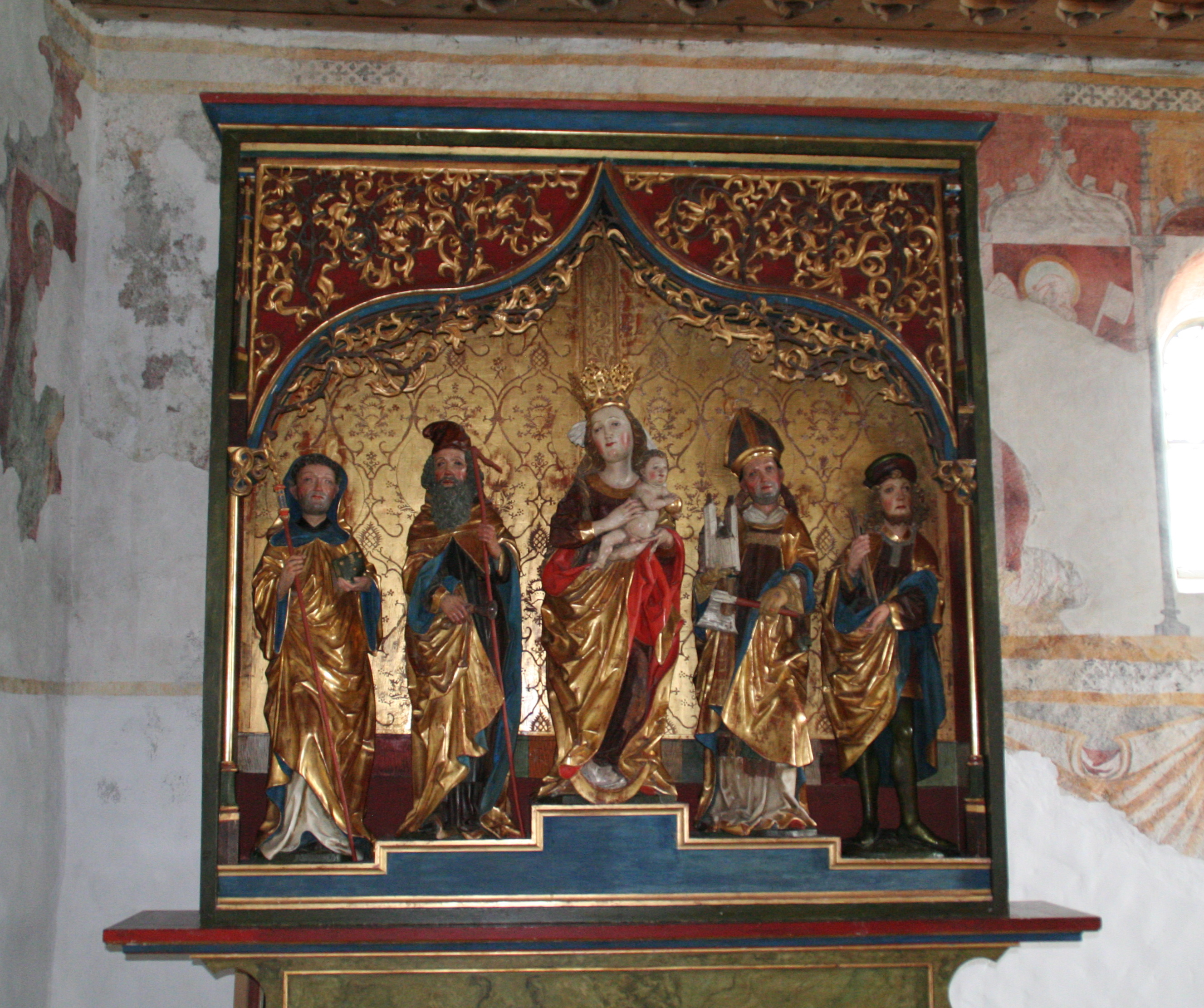 Kapelle St. Eusebius Altar Bernhard Strigel